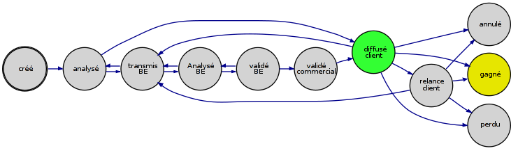 Exemple de Workflow réalisé avec Freedom-ECM Contents 1 Source 2 Licensing 3 Licensing 4 Original upload log Source J'ai personnellement réalisé cette image avec Freedom-ECM pour ensuite la mettre à disposition dans Wikipédia. Licensing Cette image est complêtement libre de droits.